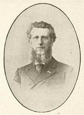 portret van hett Tweede Kamerlid Hendrik Bijleveld (1848-1918)